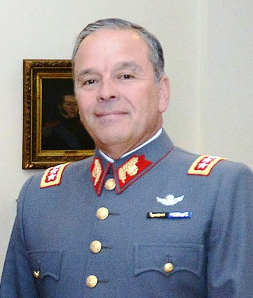 Humberto Patricio Oviedo Arriagada (Santiago, 28 de julio de 1959) es un militar chileno, que actualmente ostenta el grado de General de Ejército y que ocupa el cargo de Comandante en jefe del Ejército de Chile desde el 9 de marzo de 2014, sucediendo a Juan Miguel Fuente-Alba.